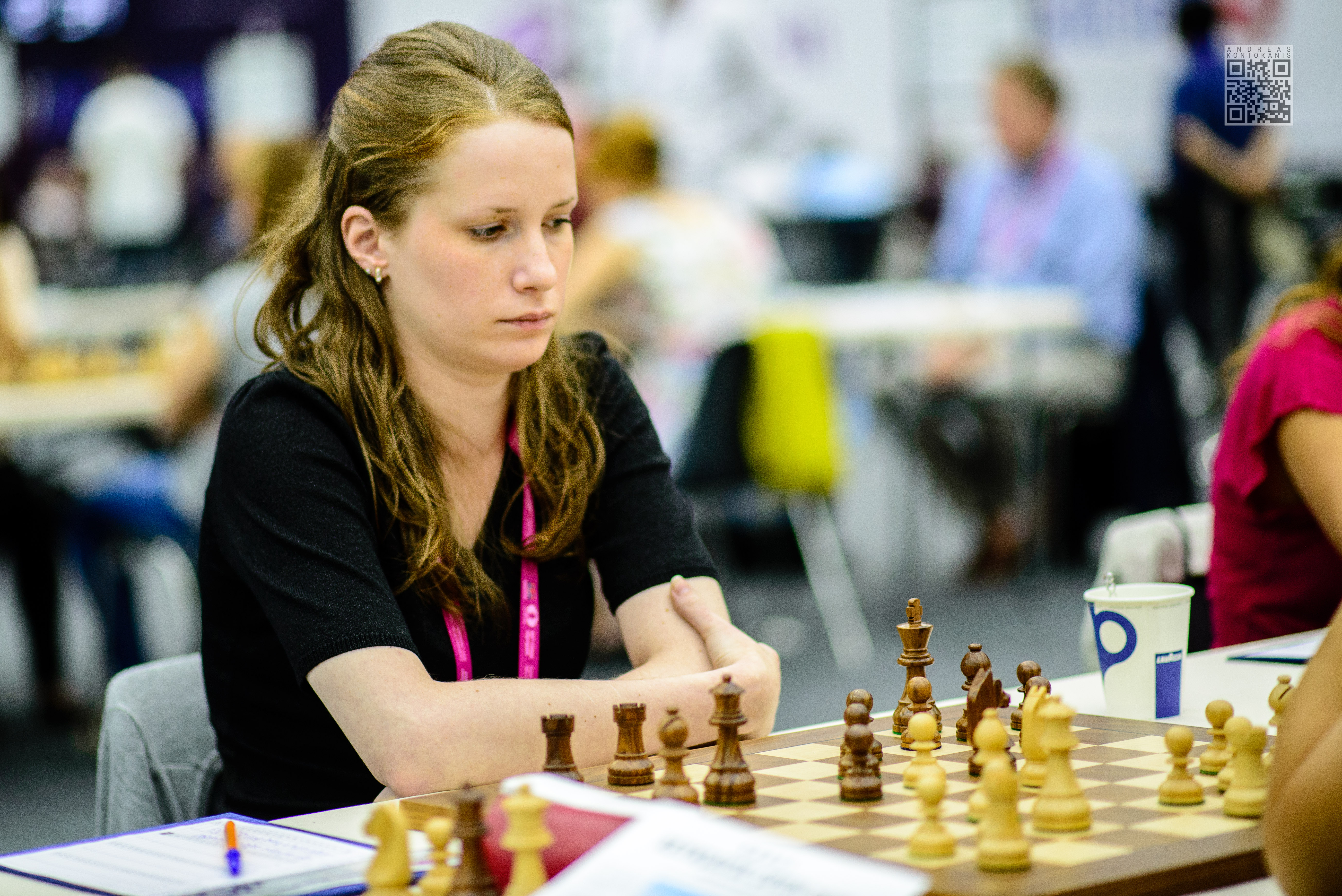 Golubenko Valentina